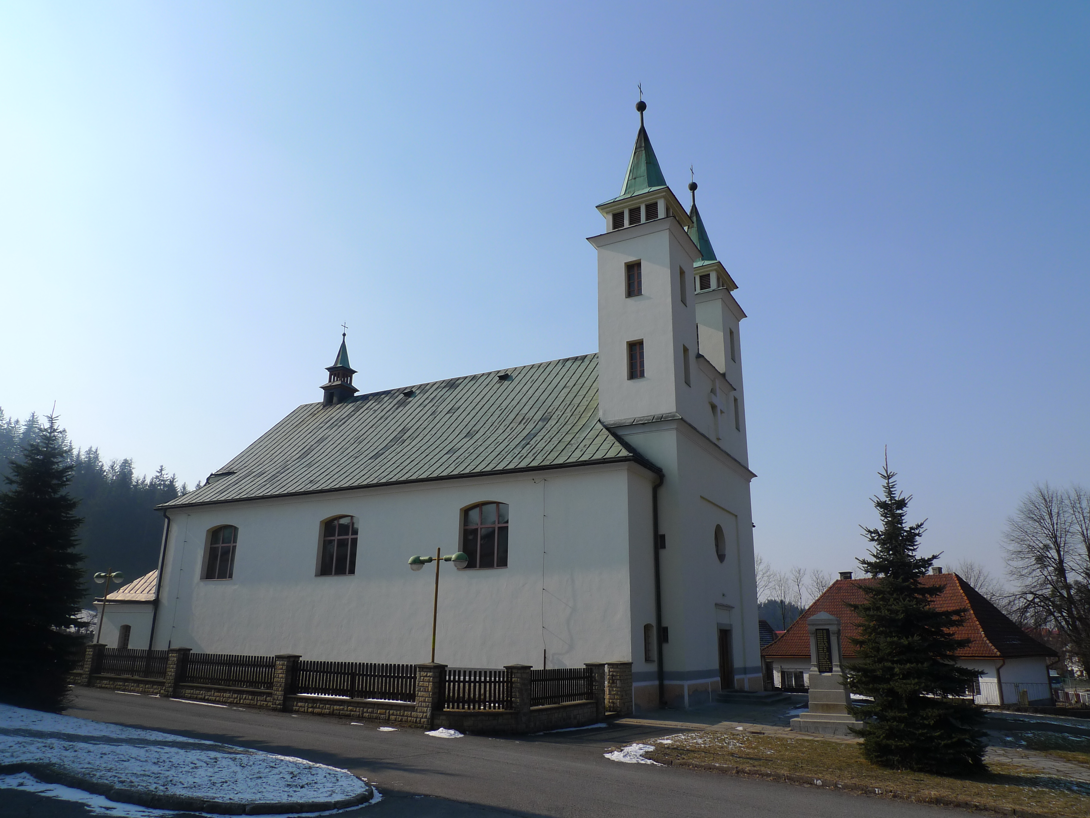 Farní kostel sv. Jana a Pavla na Horní Bečvě